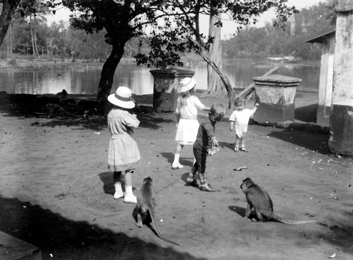 Negatief. Kinderen voeren de apen in de badplaats Wendit